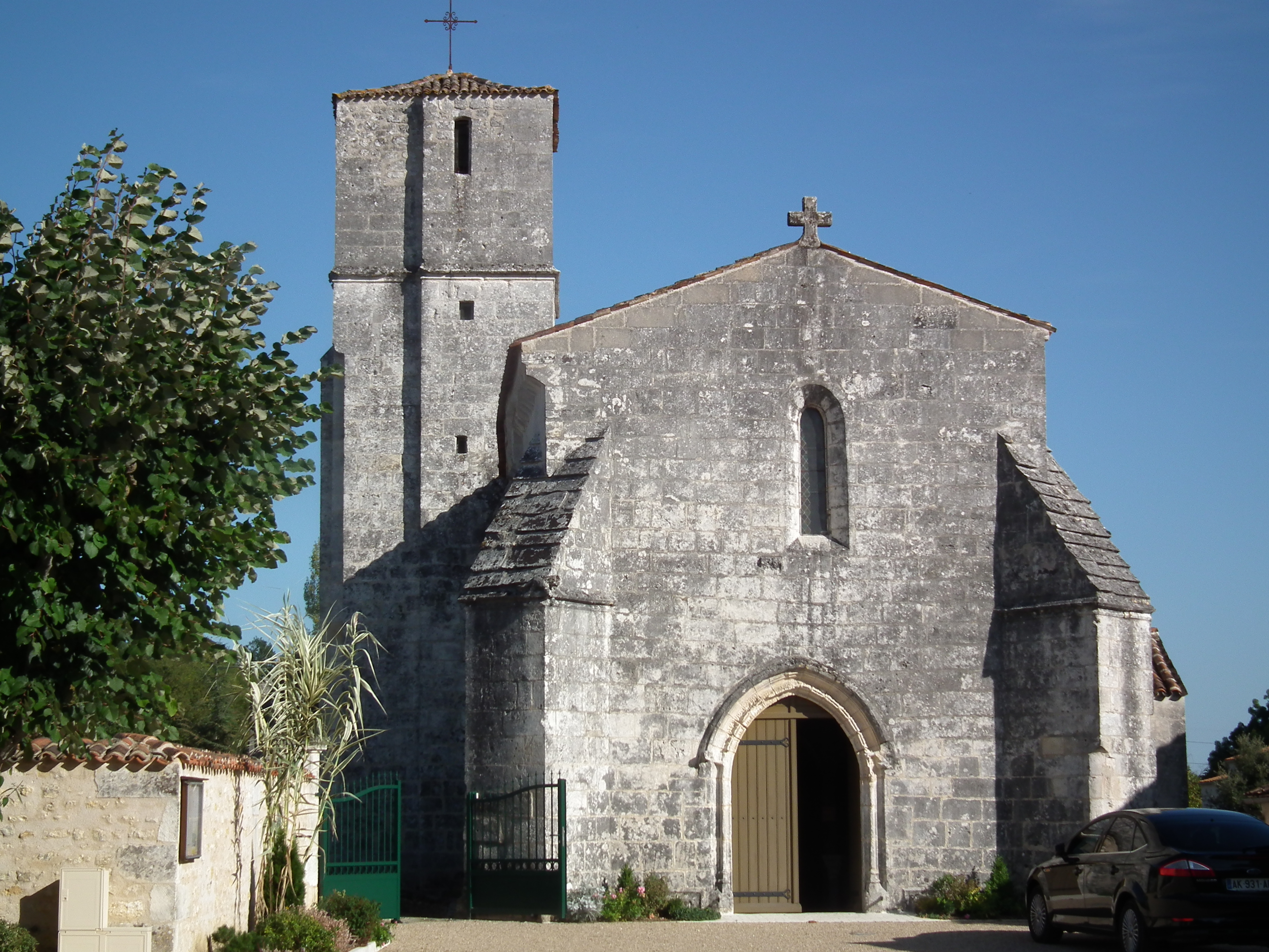 L'église de Vénérand